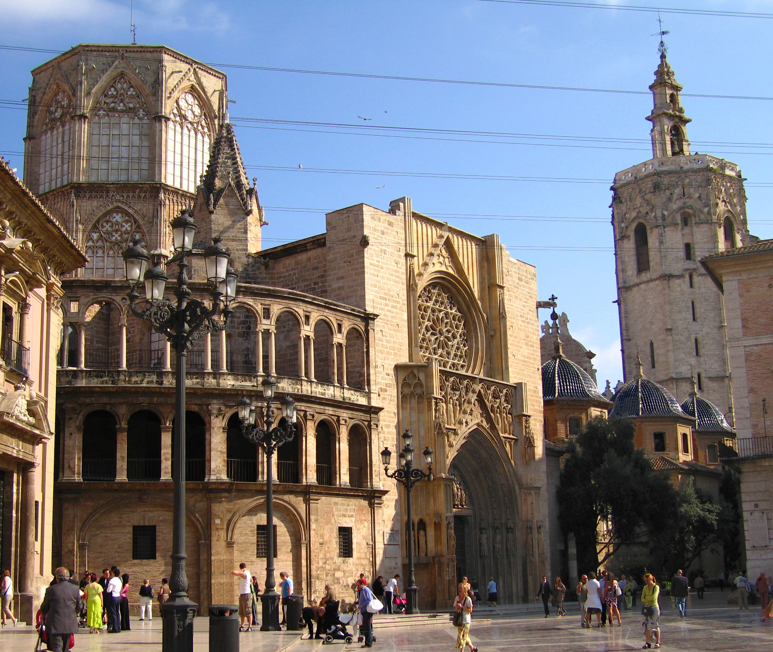 Seu de València